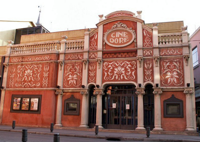 Cine Doré, calle Santa Isabel 3, esquina con el pasaje Doré, Madrid. Obra de Críspulo Moro Cabeza de 1923. Conocido en la posguerra como el "palacio de las pipas". Actualmente es sede de la Filmoteca Española, tras su rehabilitación entre 1982-1990.